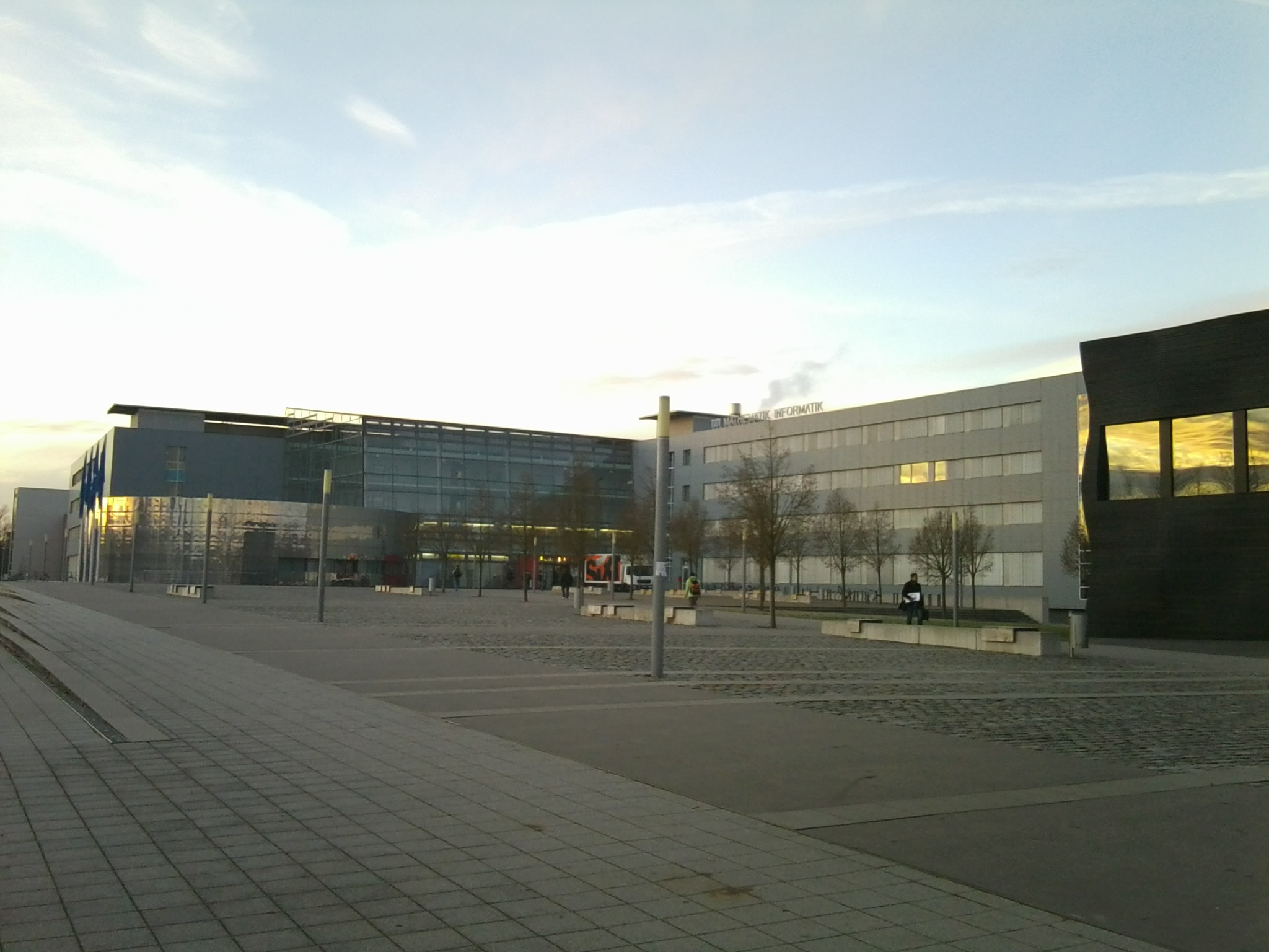 TUM Garching FMI mit Interims 1